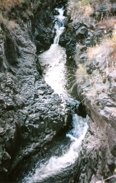 תצלום he:נחל זוויתן (he:אפריל, he:2004)